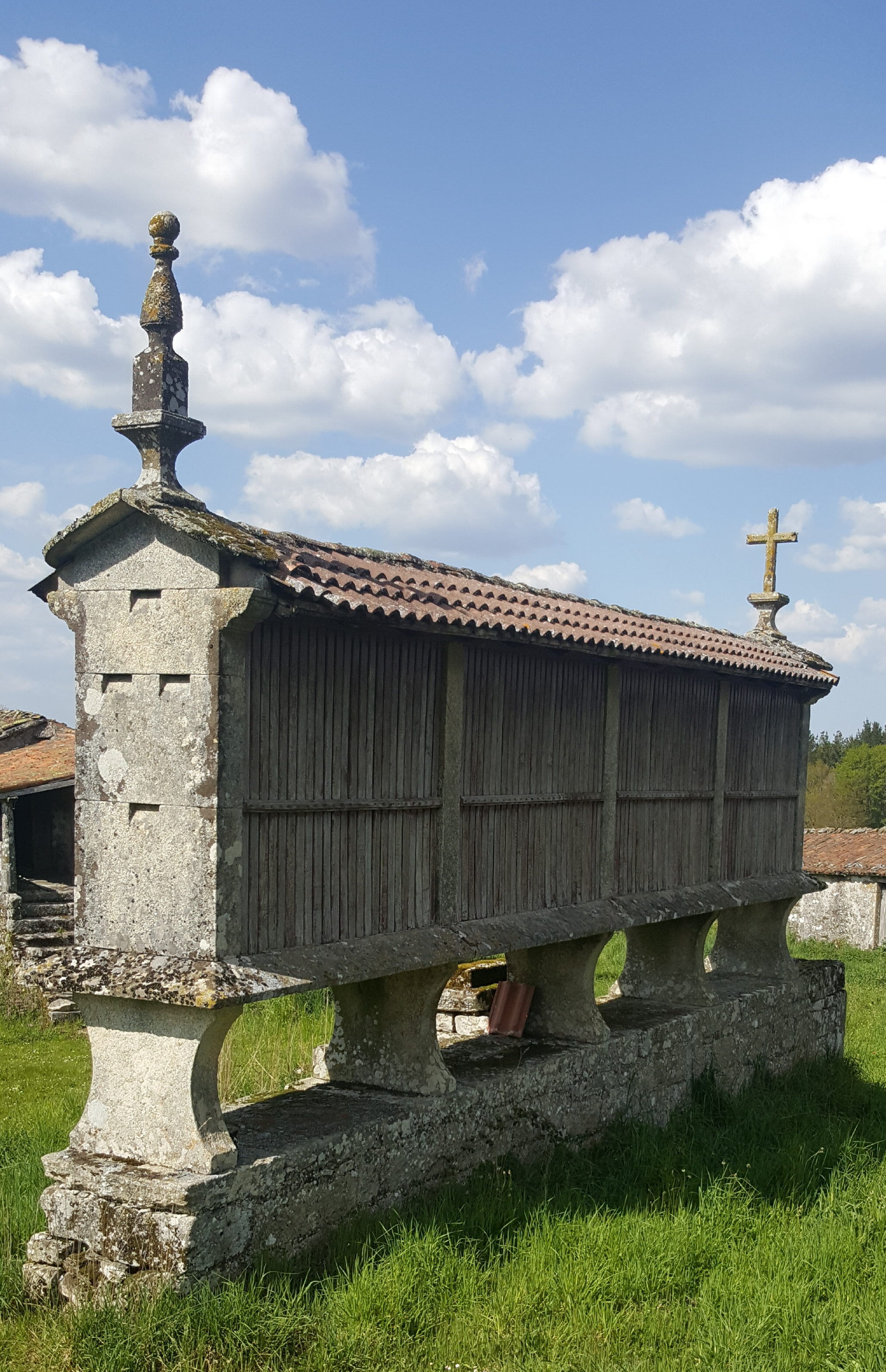 Hórreo en Nugallás - San Fiz de Amarante (Antas de Ulla)